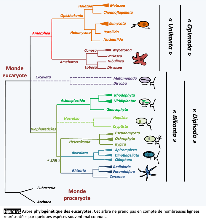 Arbre phylogénétique des eucaryotes - Philippe Silar. Protistes Eucaryotes: Origine, Evolution et Biologie des Microbes Eucaryotes. 2016,978-2-9555841-0-1. �hal-01263138